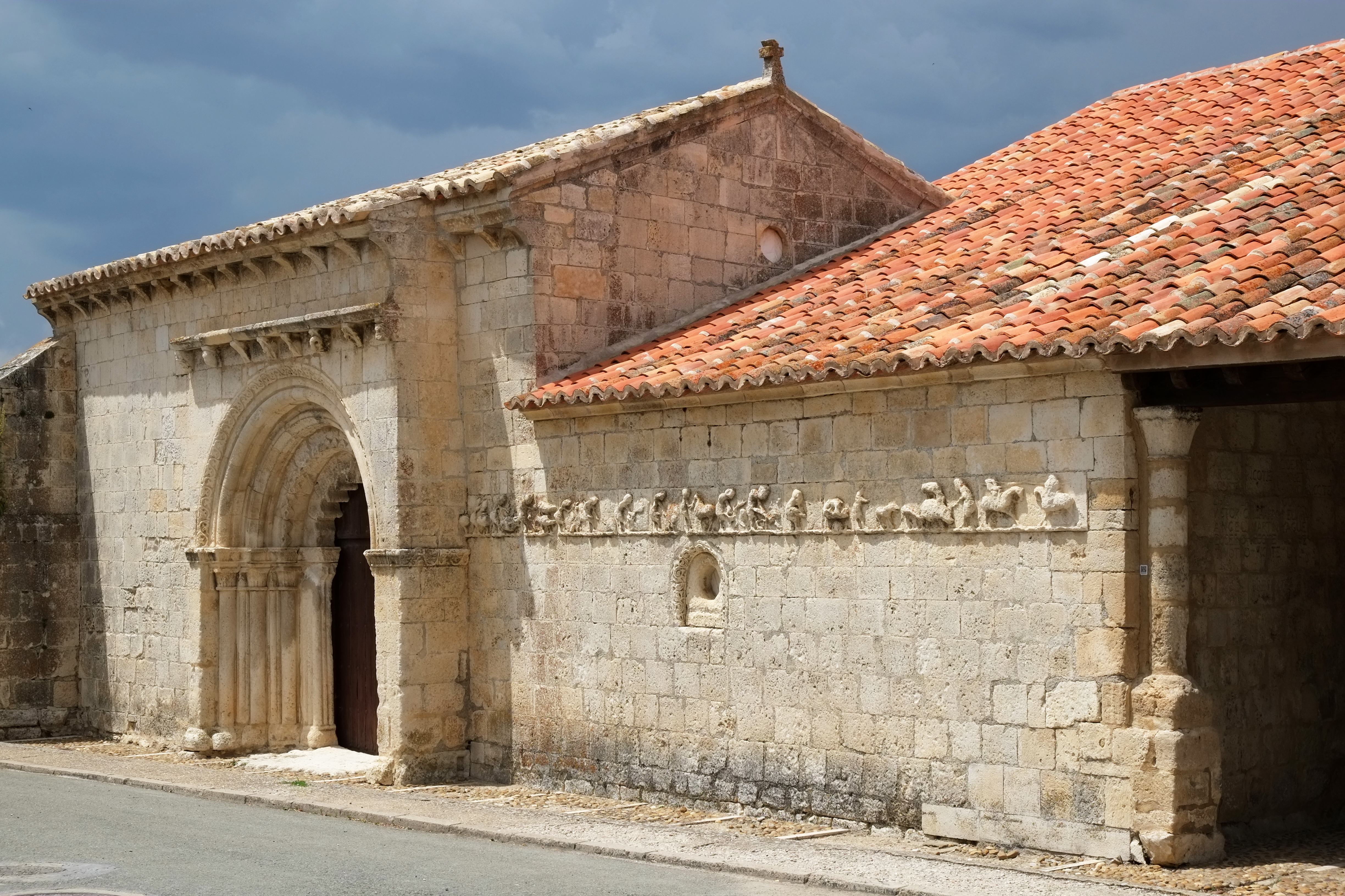 Kirche San Bartolomé in Campisábalos in der Provinz Guadalajara in Spanien